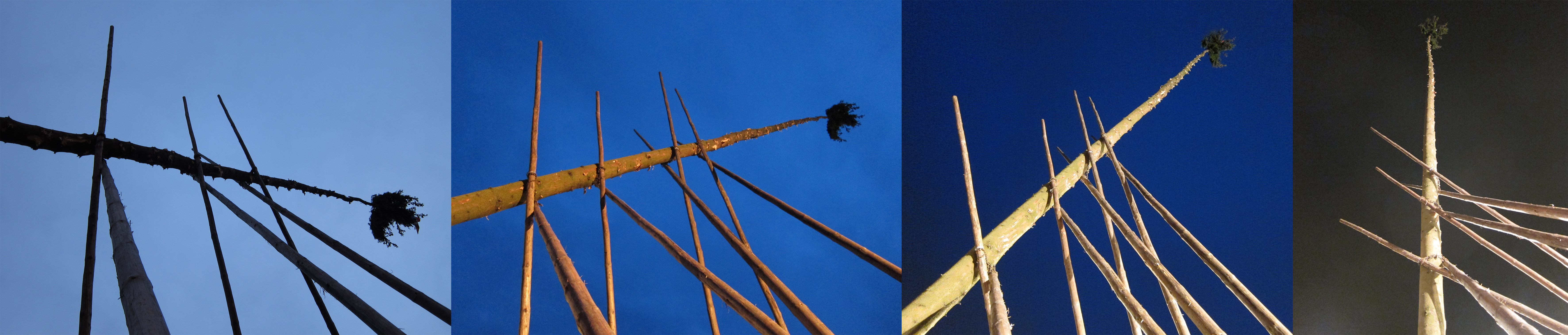 Meiboom in Eckelrade, 17 mei 2012